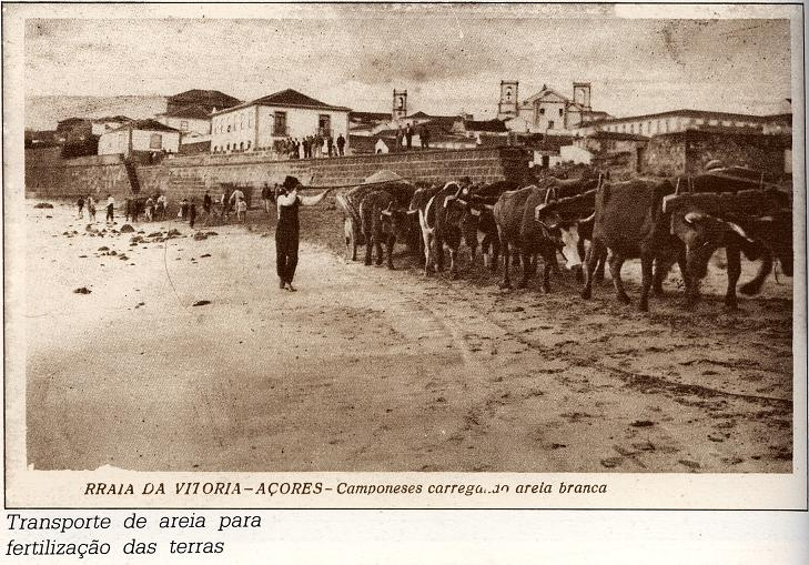 Camponeses na apanha de areia para fertilização dos campos, no ínicio do século xx, com o Quartel do Posto da Praia ao centro.